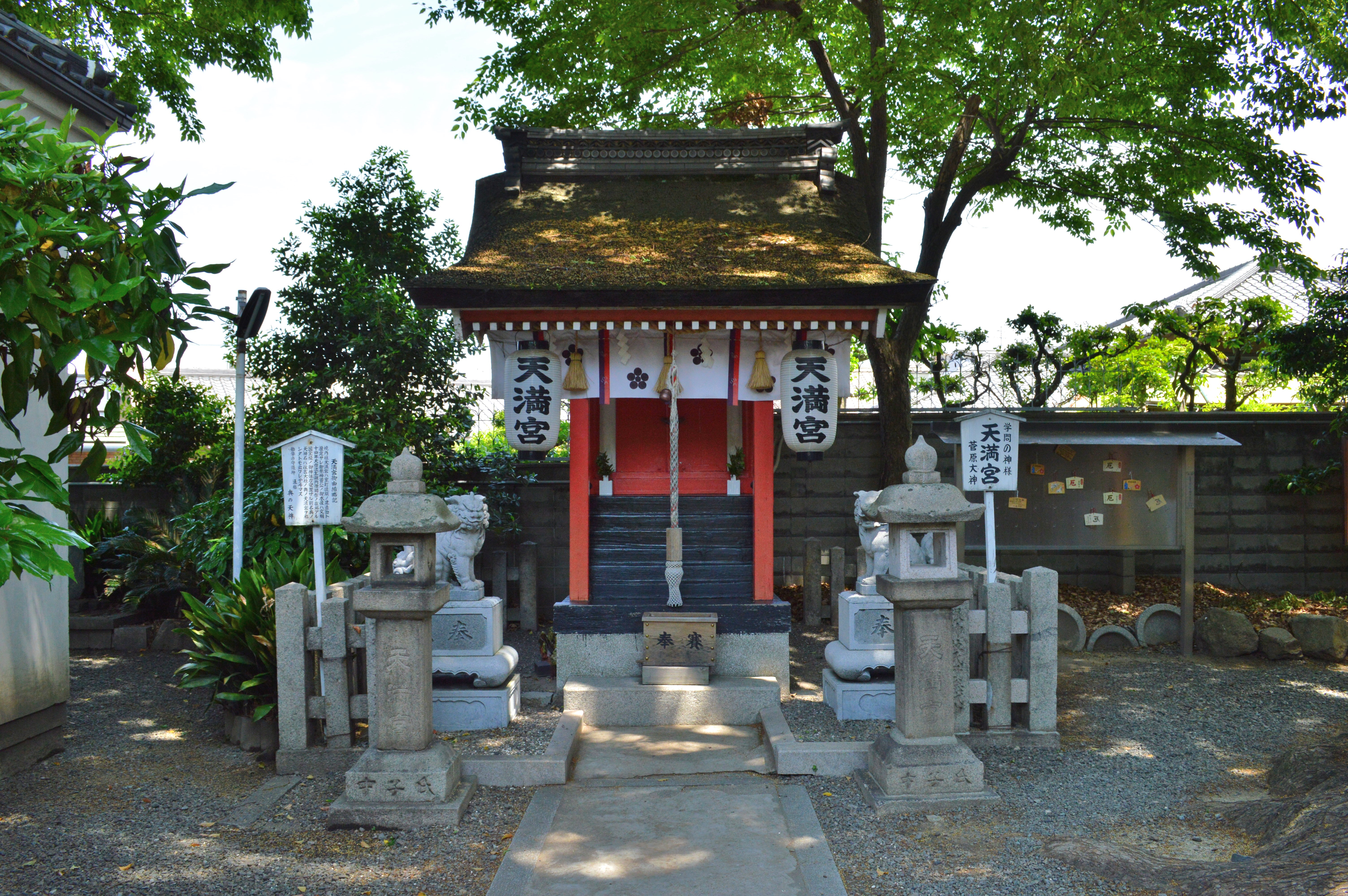 生根神社 (大阪市住吉区) 境内天満宮